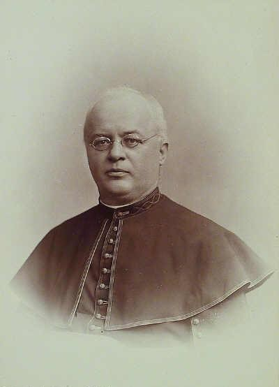 Franz Martin Schindler (1847-1922), Rakouský duchovní, teolog a politik